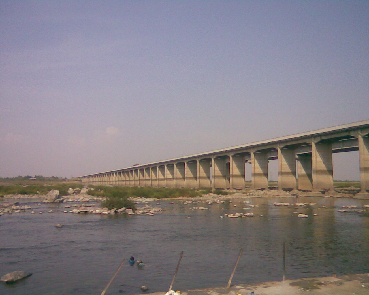 కృష్ణానదిపై రోడ్డువంతెన,బీచుపల్లి